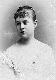 Александра Георгиевна Романова, жена великого князя Павла Александровича